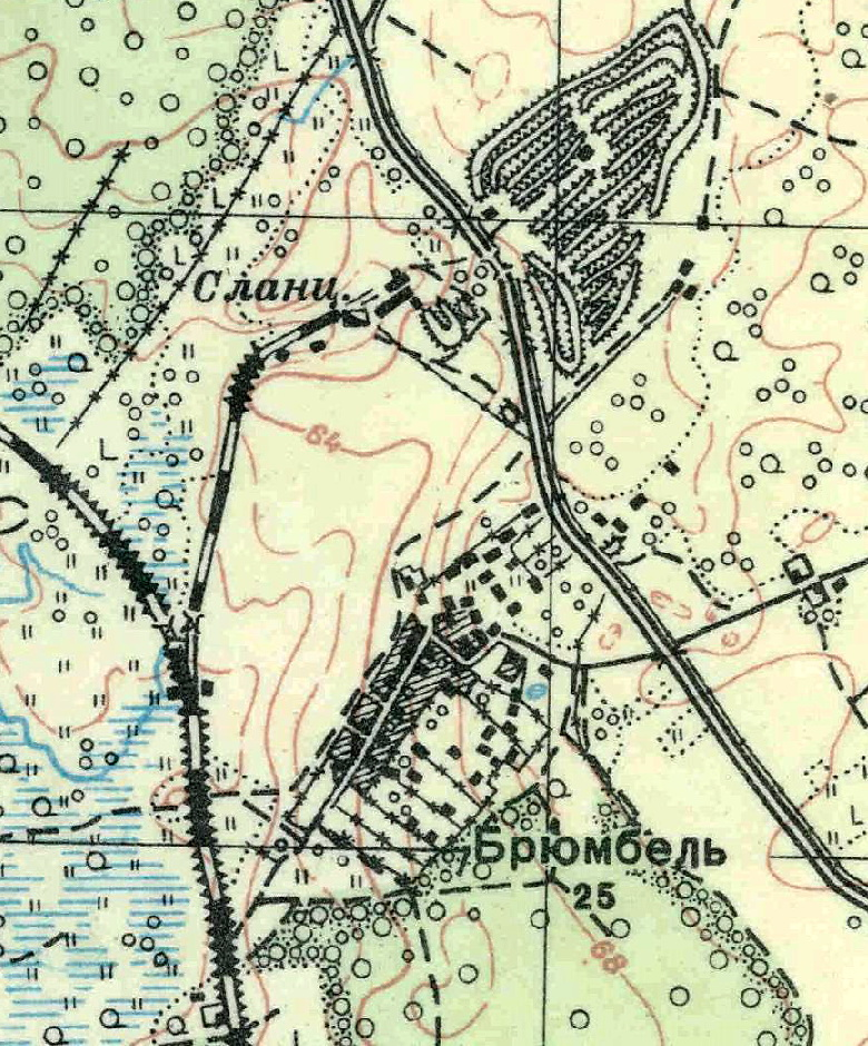 Топографическая карта Ленинградской области, квадрат О-35-22-Г-в (Мануйлово), деревня Брюмбель.